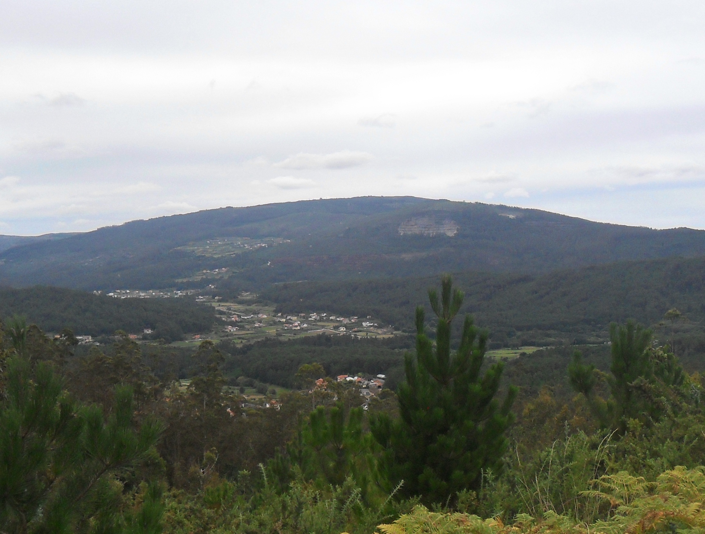 Monte Iroite desde el este